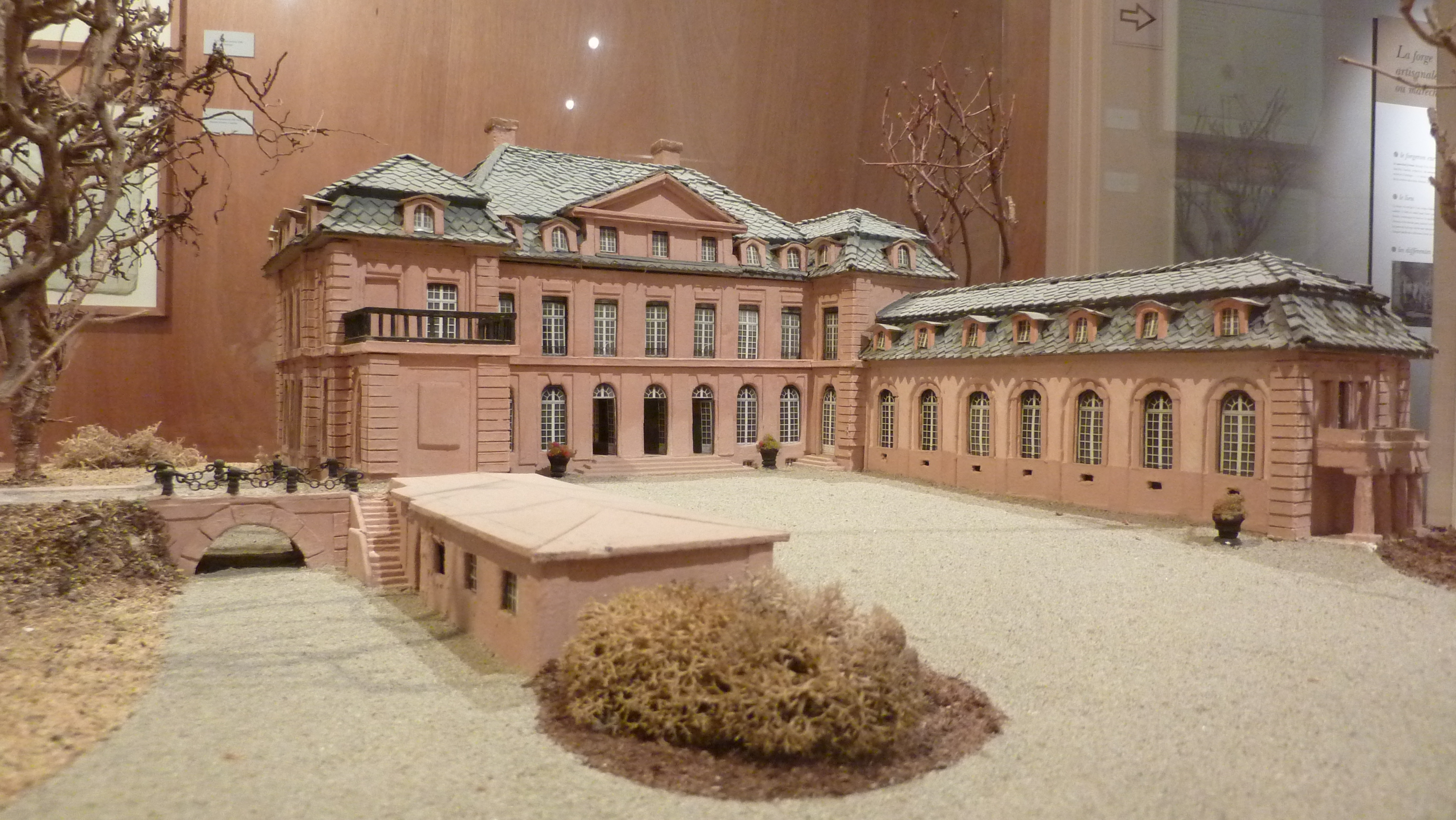 Maquette du château De Dietrich, exposée au Musée Historique et Industriel - Musée du Fer de Reichshoffen.